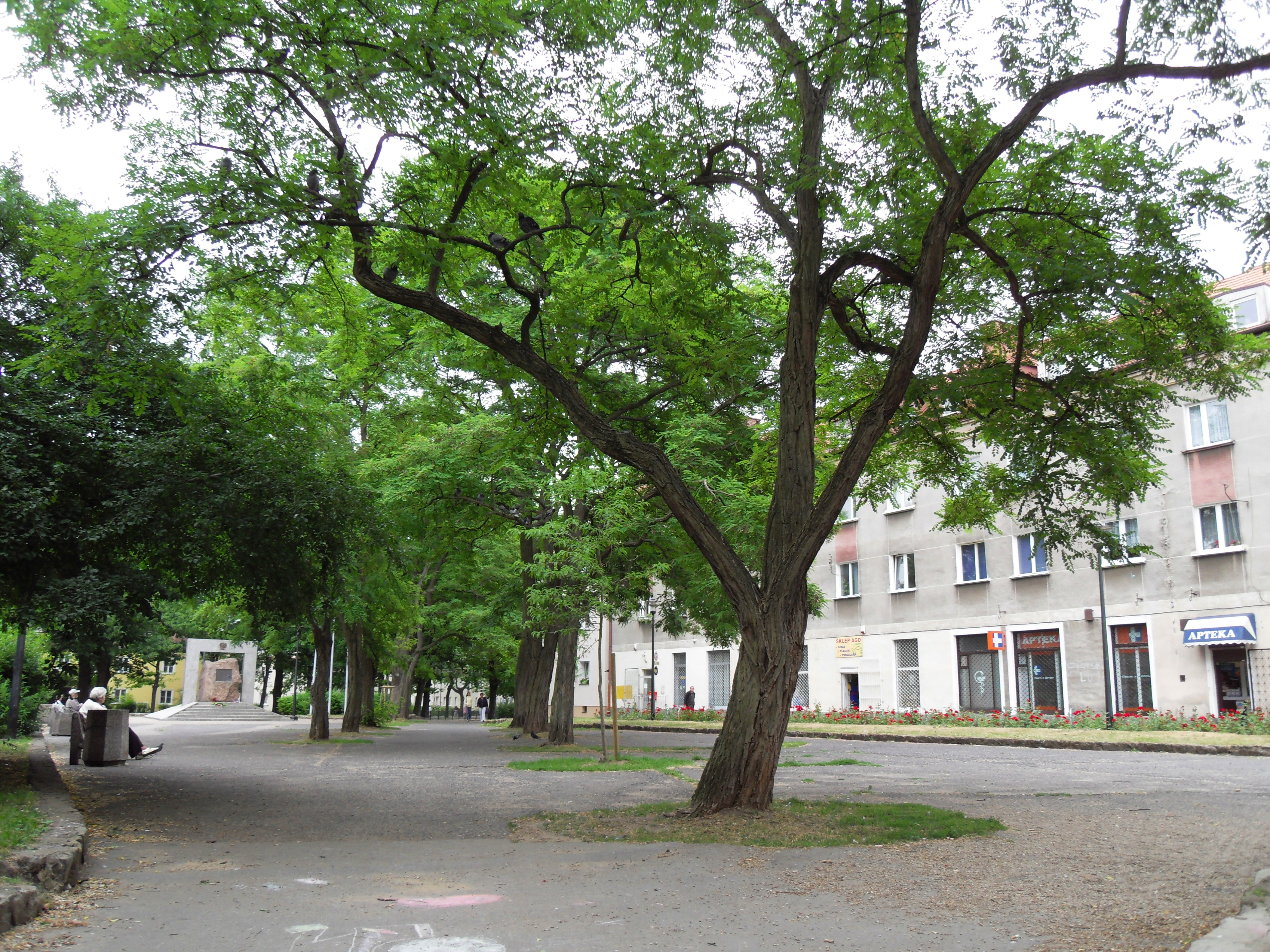 Gdańsk Strzyża, plac generała Stanisława Maczka.